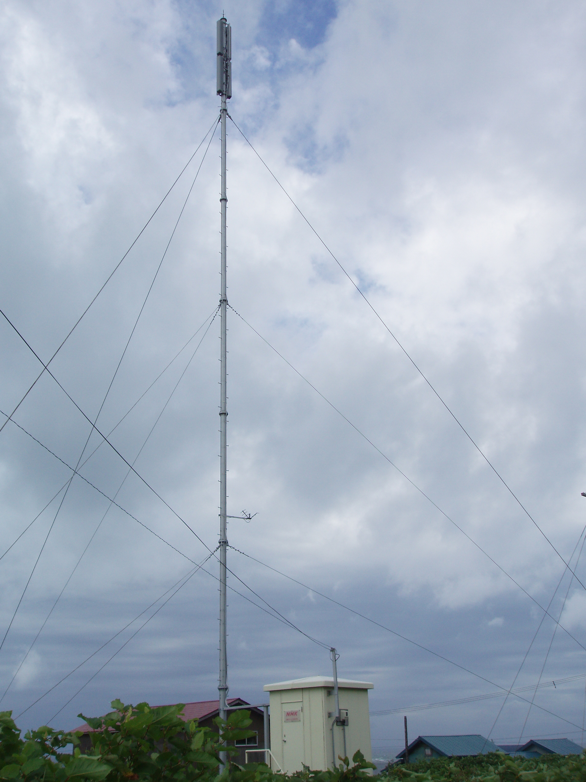 西稚内中継局 NHK送信設備